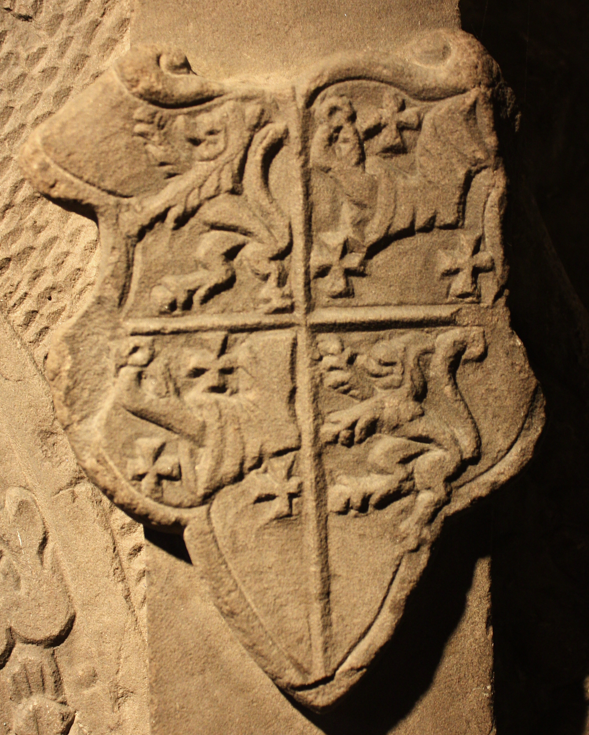 Das vermehrtet Wappen Beyer von Boppard und von Lösnich als Ahnenprobe auf dem Grabmal der Katharina von Wiltz (+1573) in der Dekanatskirche St. Peter und Paul in Niederwiltz in Luxenburg.